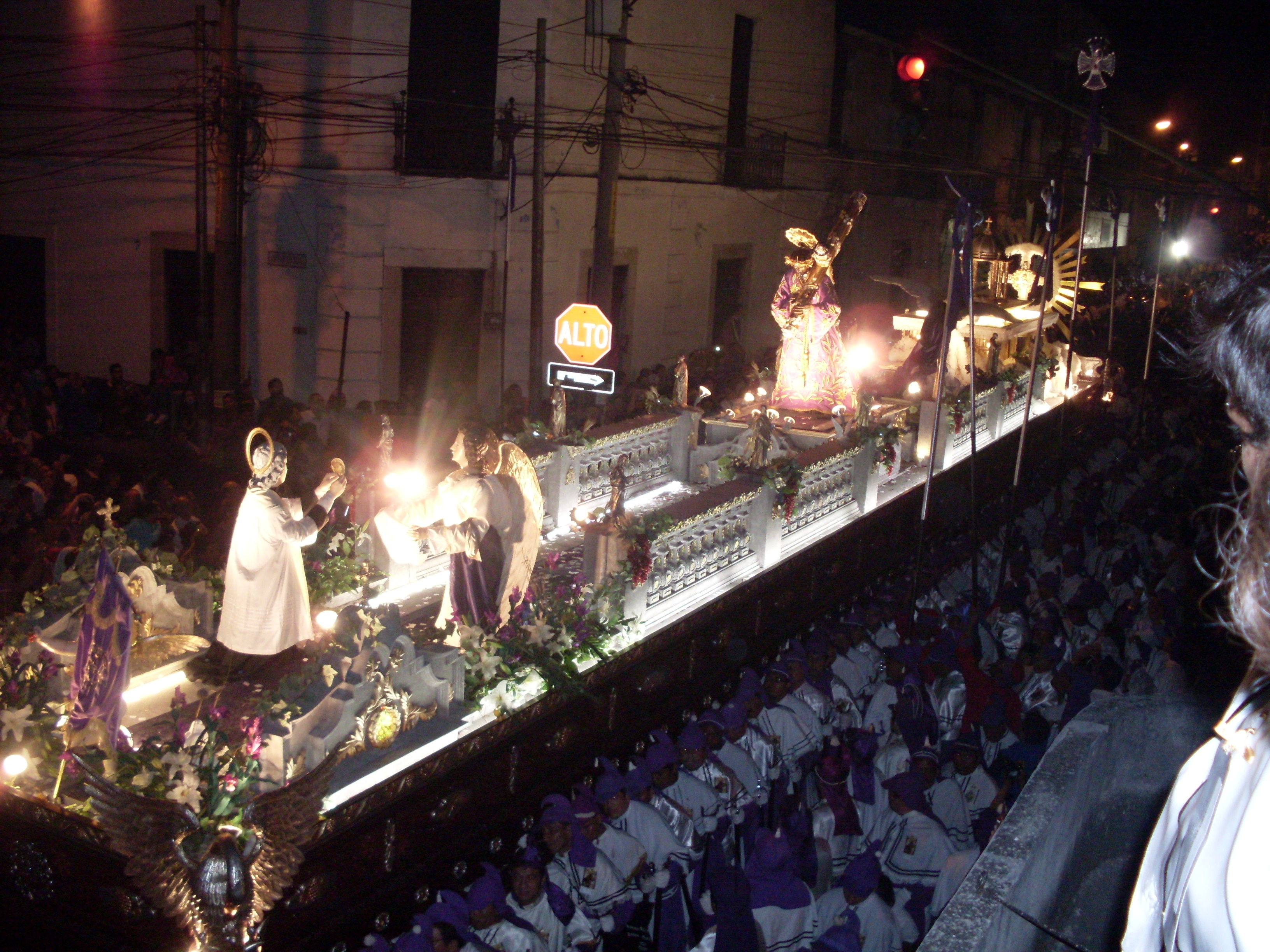 Procesión de la Iglesia de la Candelaria, una de las más grandes de la Capital, con 19 horas de recorrido, en un anda de 116 cargadores por turno, en uno de los días más concurridos de la Semana Santa guatemalteca.